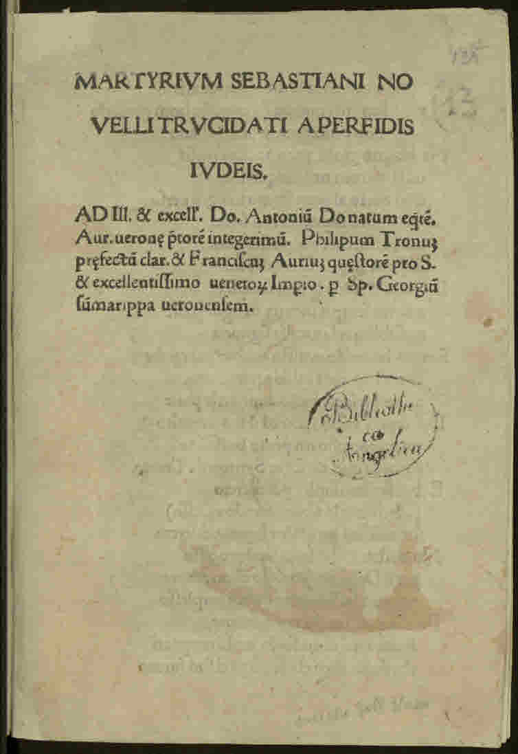 Martyrium Sebastiani novelli (italiano). - Tarvisii impressum : quidem est opus mira arte et diligentia Bernardini Celerii de Luere, Anno Christi nativitatis MCCCCLXXX die XII madii. - 6 c. ; [*]⁶ ; 4° .